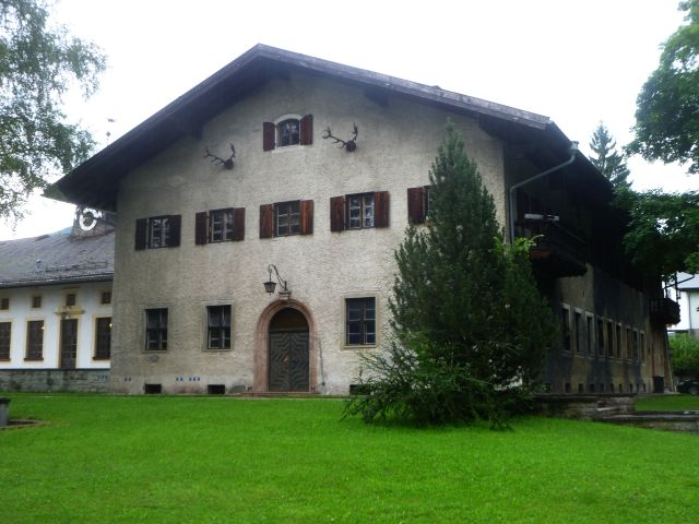 Rainer-Kaserne_-_Wirtschaftsgebäude